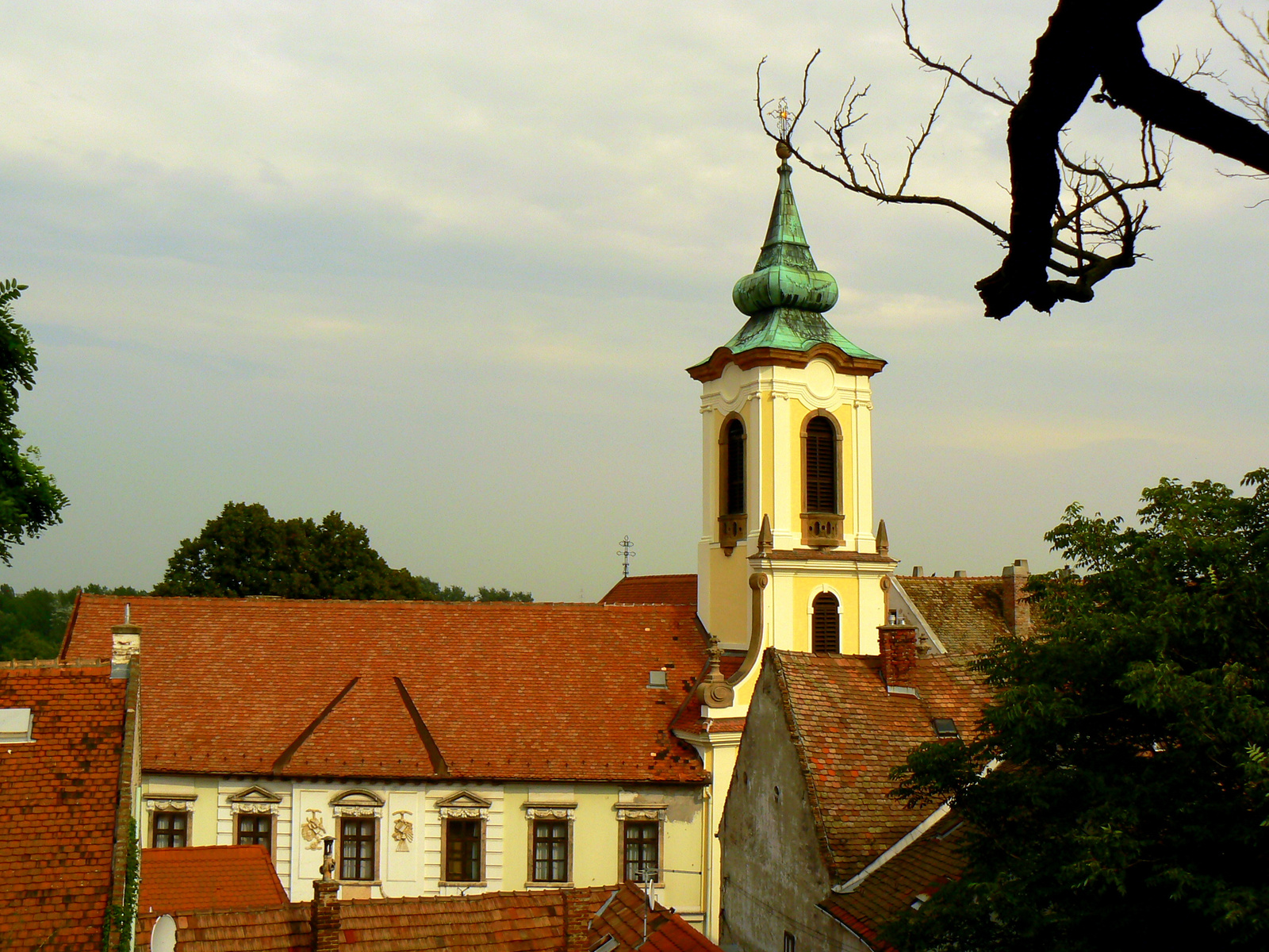 Blagovesztenszka-templom (Szentendre, Fő tér) This is a photo of a monument in Hungary. Identifier: 7351